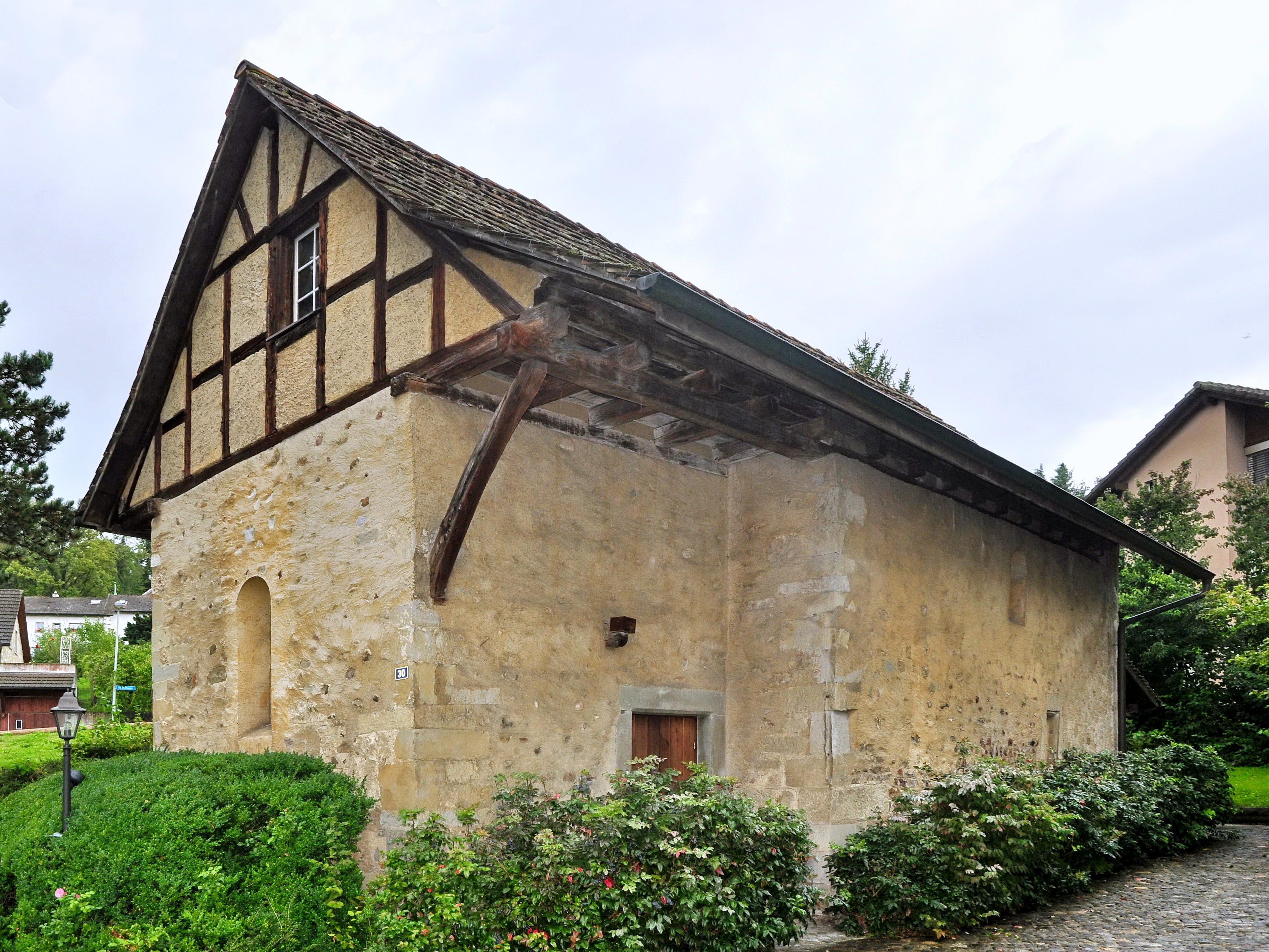 Sogenannte «Obere Kirche» bzw. «Reginlikapelle» (üblicherweise «Niklauskapelle»), Mühlestrasse in Regensdorf (Switzerland)